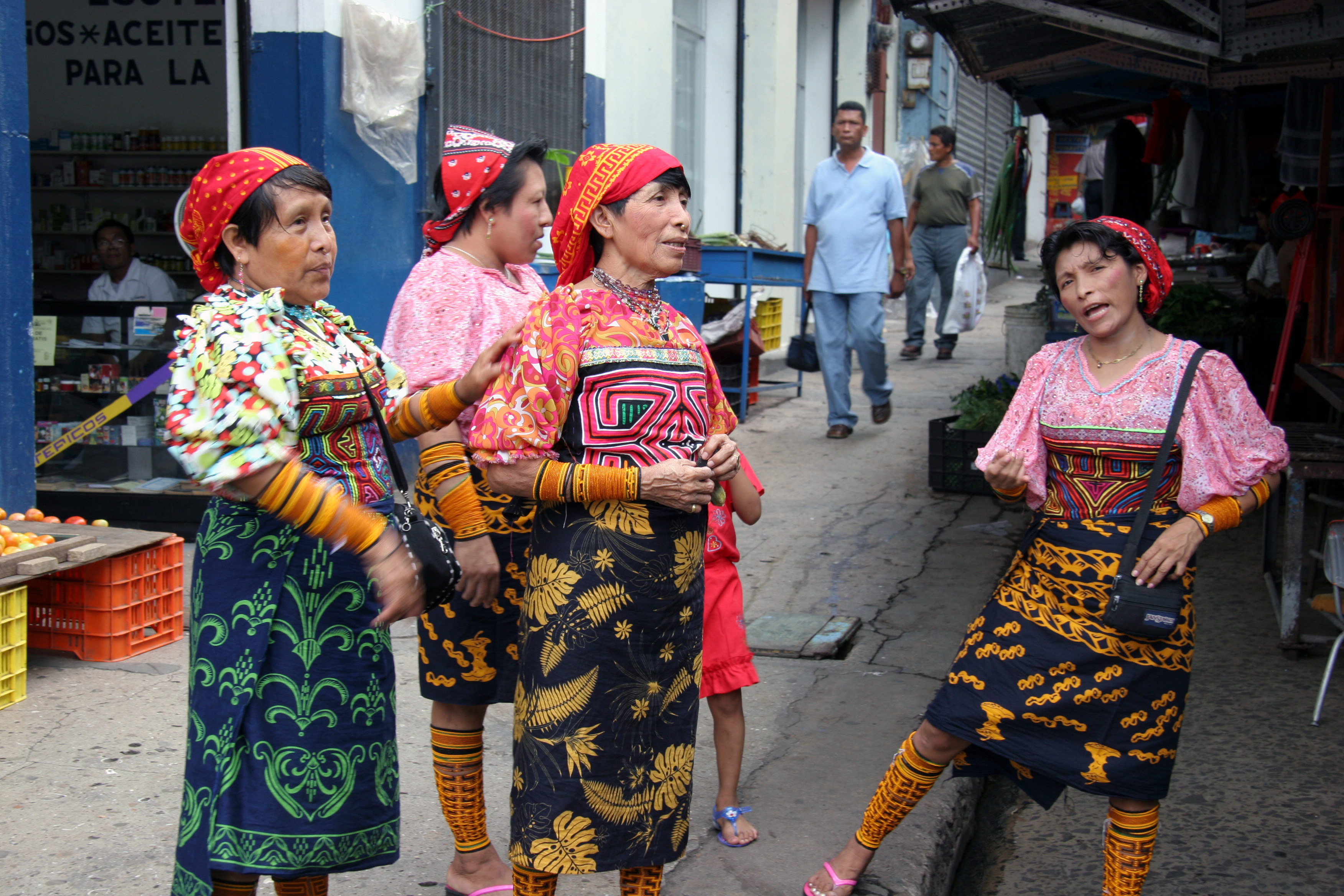 Panama, panama city, femmes kuna